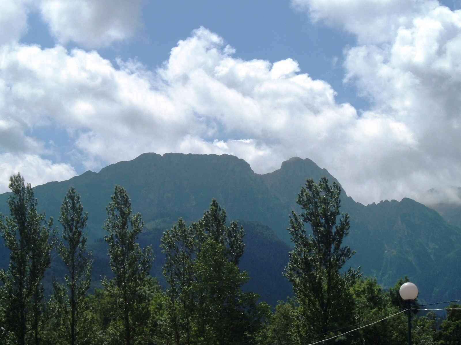 Zakopane, Poland